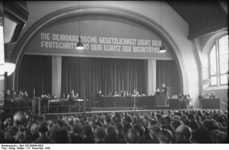 Illus/Heilig, 15.12.1950 Der Prozeß gegen den Solvay-Konzern begann am 14. Dezember 1950 in Bernburg. U.B.z: Übersicht während der Verhandlung.